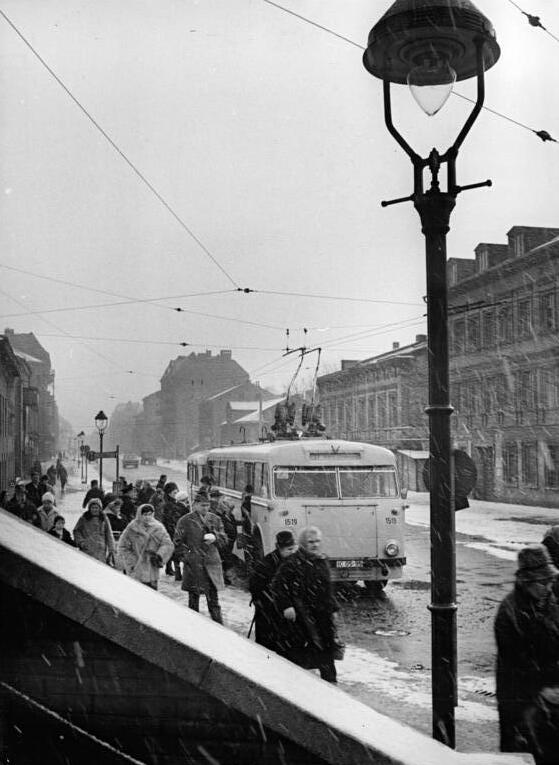 Berlin, Bushaltestelle am Bahnhof Lichterberg, Winter Zentralbild Spremberg Spre-Pr 23.2.1965 Berlin: Morgens am Bahnhof Lichtenberg Eilig hasten die Menschen am Morgen zur S- oder U-Bahn. Wenig später beginnt für sie ein neuer Arbeitstag.